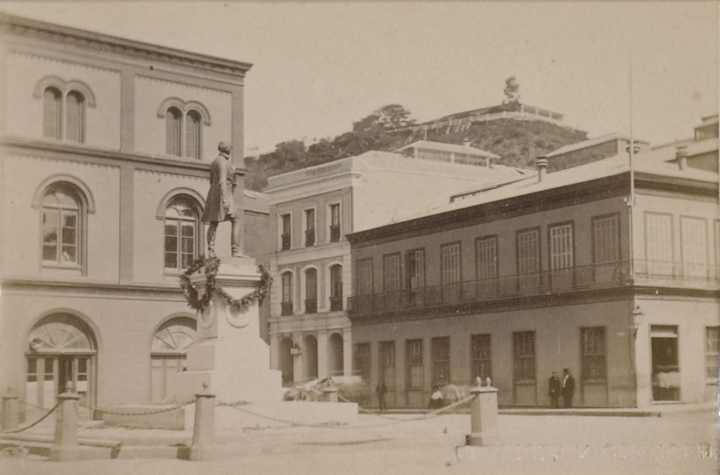 La estatua dedicada a Lord Cochrane, del 12 de febrero de 1873, fue el primer monumento de la ciudad de Valparaíso. Su inauguración en la fecha antes señalada, se hizo con toda la pompa correspondiente a tan magno evento, incluyendo salvas de artillería, desfiles militares, regatas, fuegos artificiales, aclamaciones del público y por supuesto, la presencia de Su Excelencia el Presidente de la República, Don Federico Errázuriz Zañartu, junto al primer alcalde Juan de Dios Arlegui, el jefe de la Escuadra Nacional Juan Williams Rebolledo, el ministro de guerra Aníbal Pinto Garmendia, el escritor y tribuno Benjamín Vicuña Mackenna, entre otros. Cada cual dando su correspondiente discurso que ensalsaba tan glorioso momento. En 1895 la estatua fue movida desde la plaza de la Intendencia (actual Sotomayor), a la calle Brasil (llamada en ese entonces Gran Avenida), donde fue puesta en un pedestal que le daba mas realce, y donde se mantiene hasta hoy.